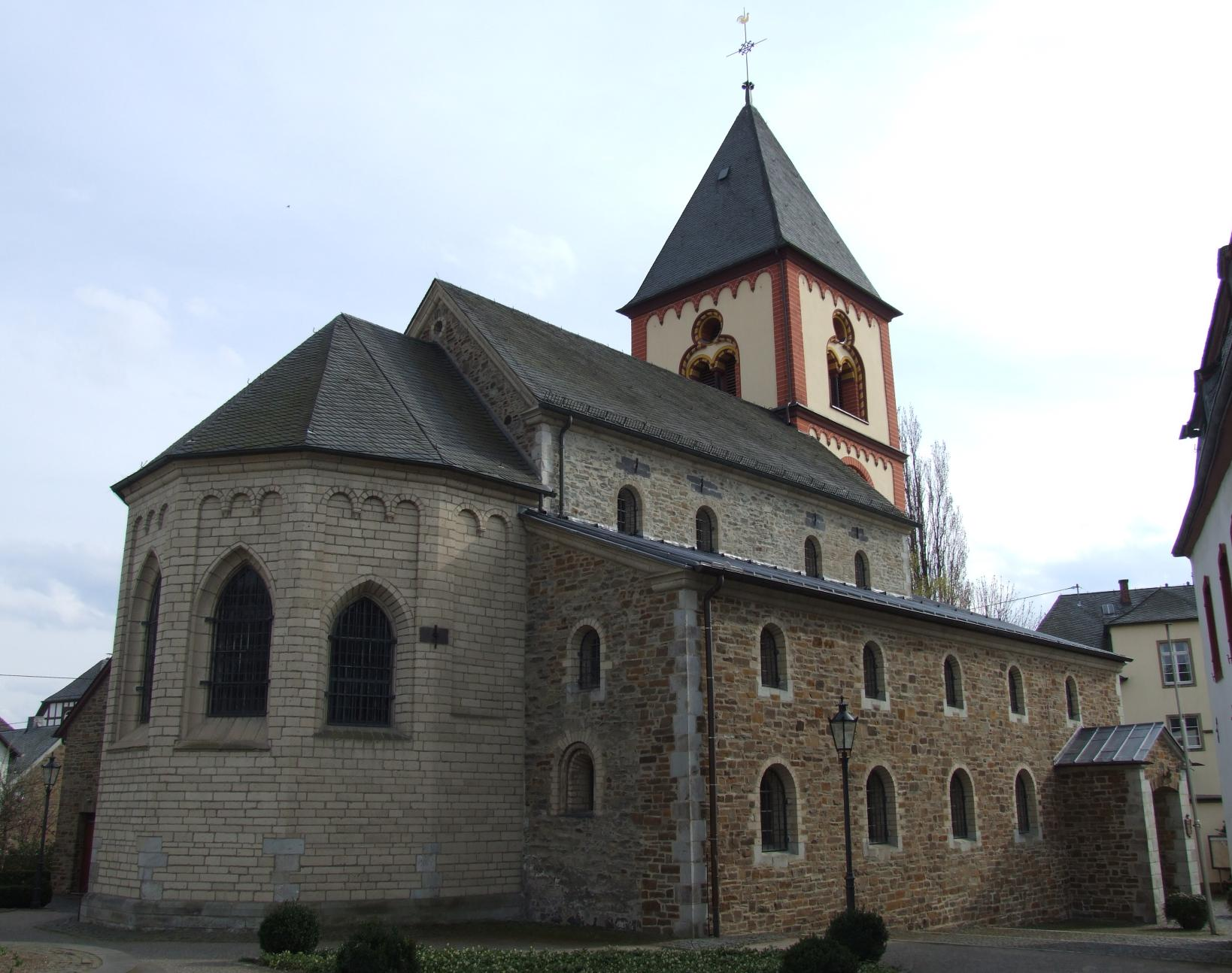 Kirche St. Severinus in Erpel